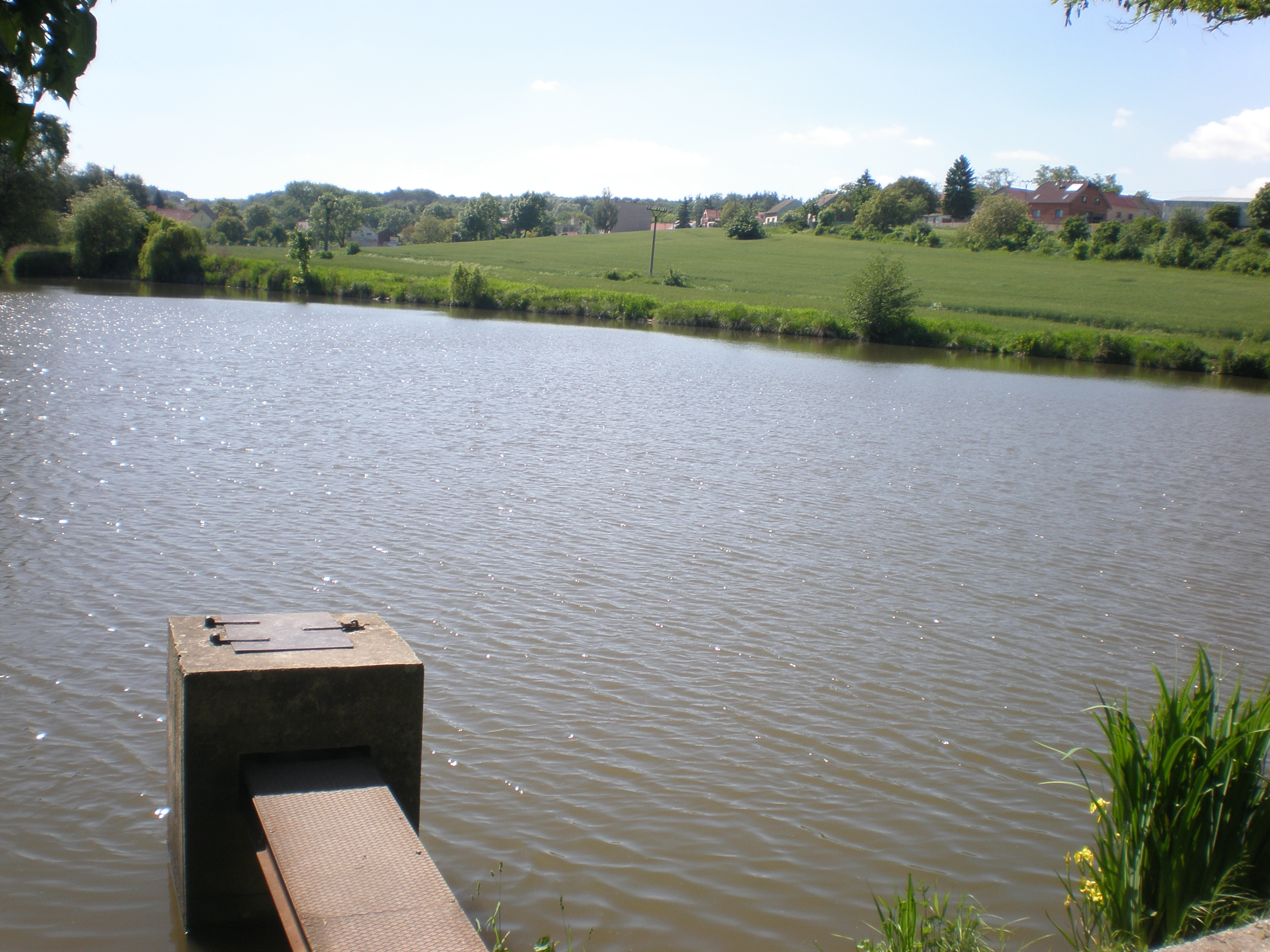 Česky: rybník Zigaňák, Ledce, okres Kladno